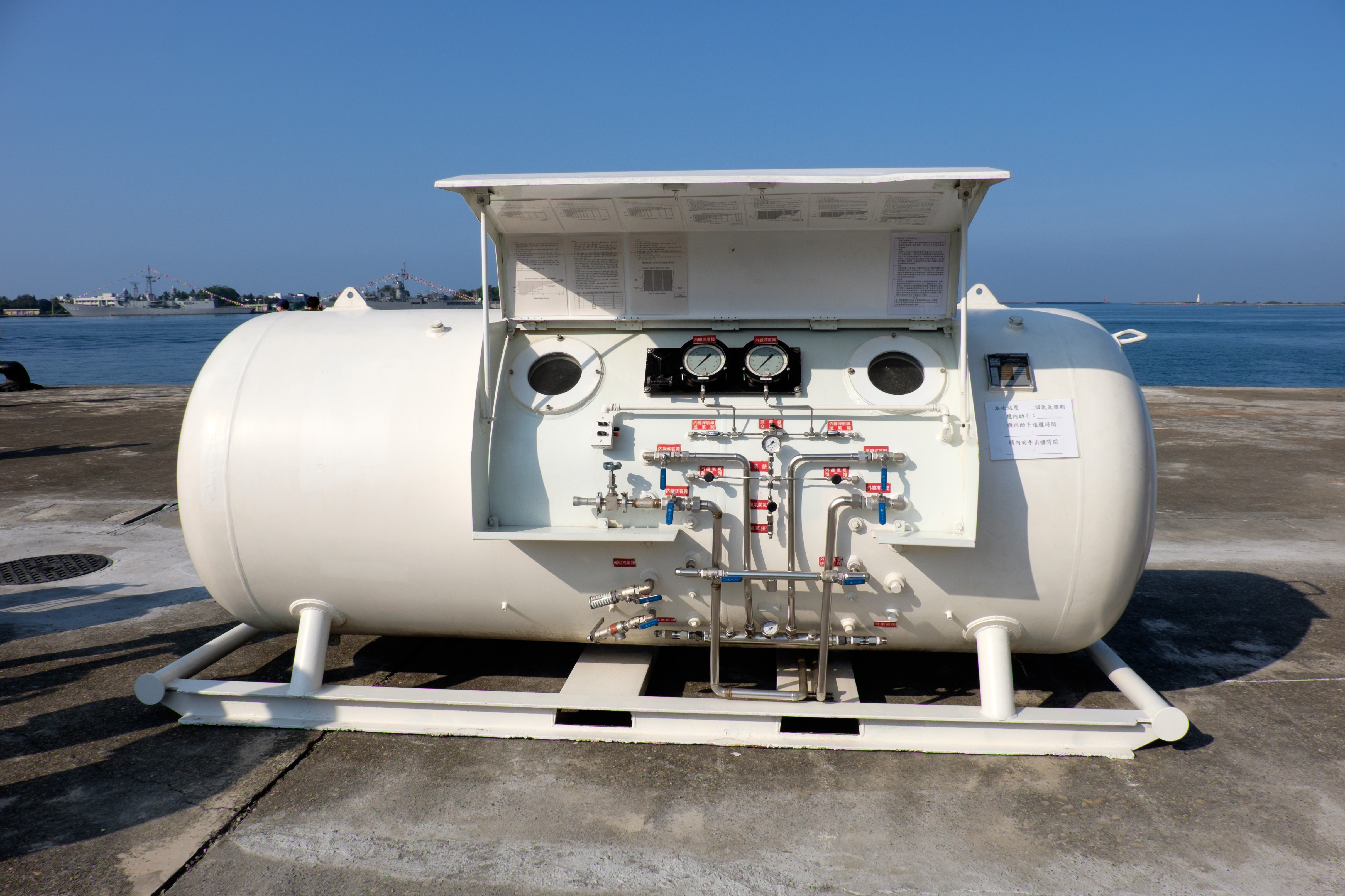 中文（台灣）: 2014年左營軍港營區開放活動，東七碼頭水下作業器材展示區展示的雙門重壓櫃，用於治療減壓病與潛水員耐壓訓練。